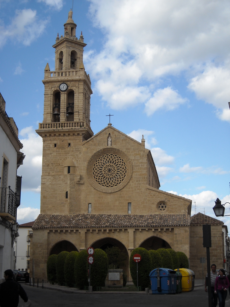 Iglesia de San Lorenzo en Córdoba (España)